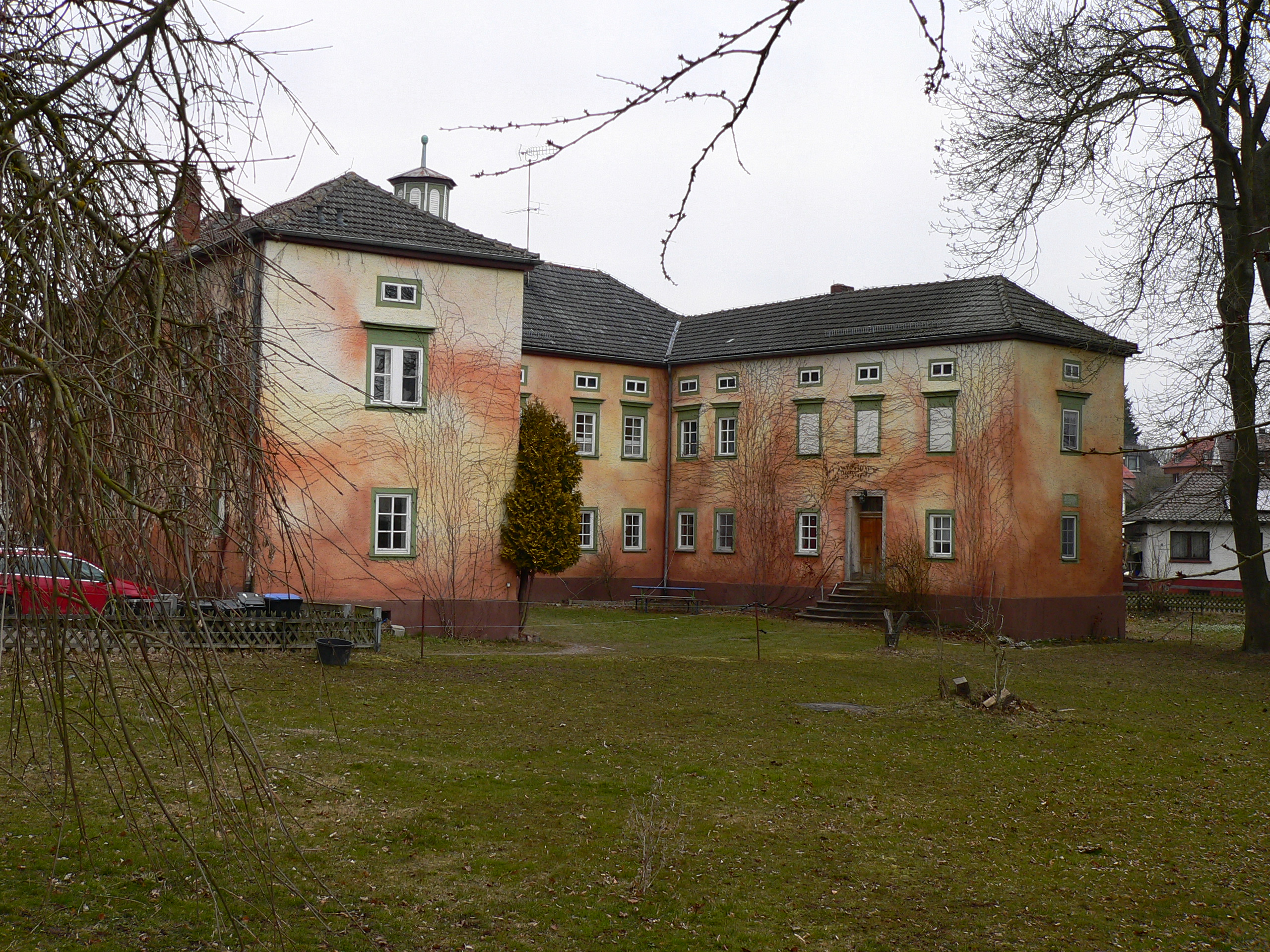 Blaues Schloss Mansbach in Hohenroda-Mansbach, Hessen, Regierungsbezirk Kassel, Landkreis Hersfeld-Rotenburg